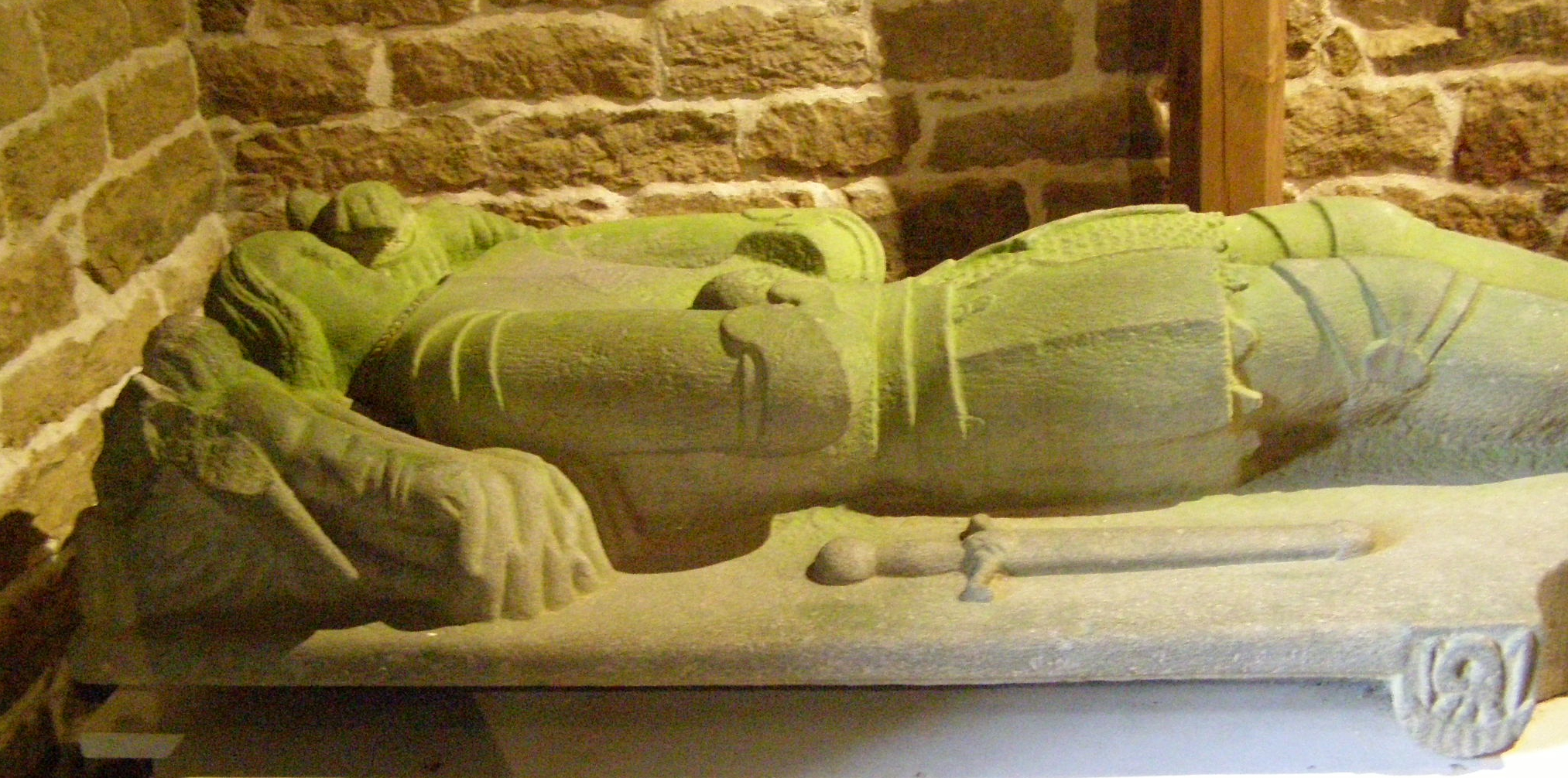 Gisant en pierre d'un seigneur du Com (Lannilis en Finistère) Chapelle du château de Kerjean. Blason des seigneurs du Com sur la lame (pélican en sa piété).